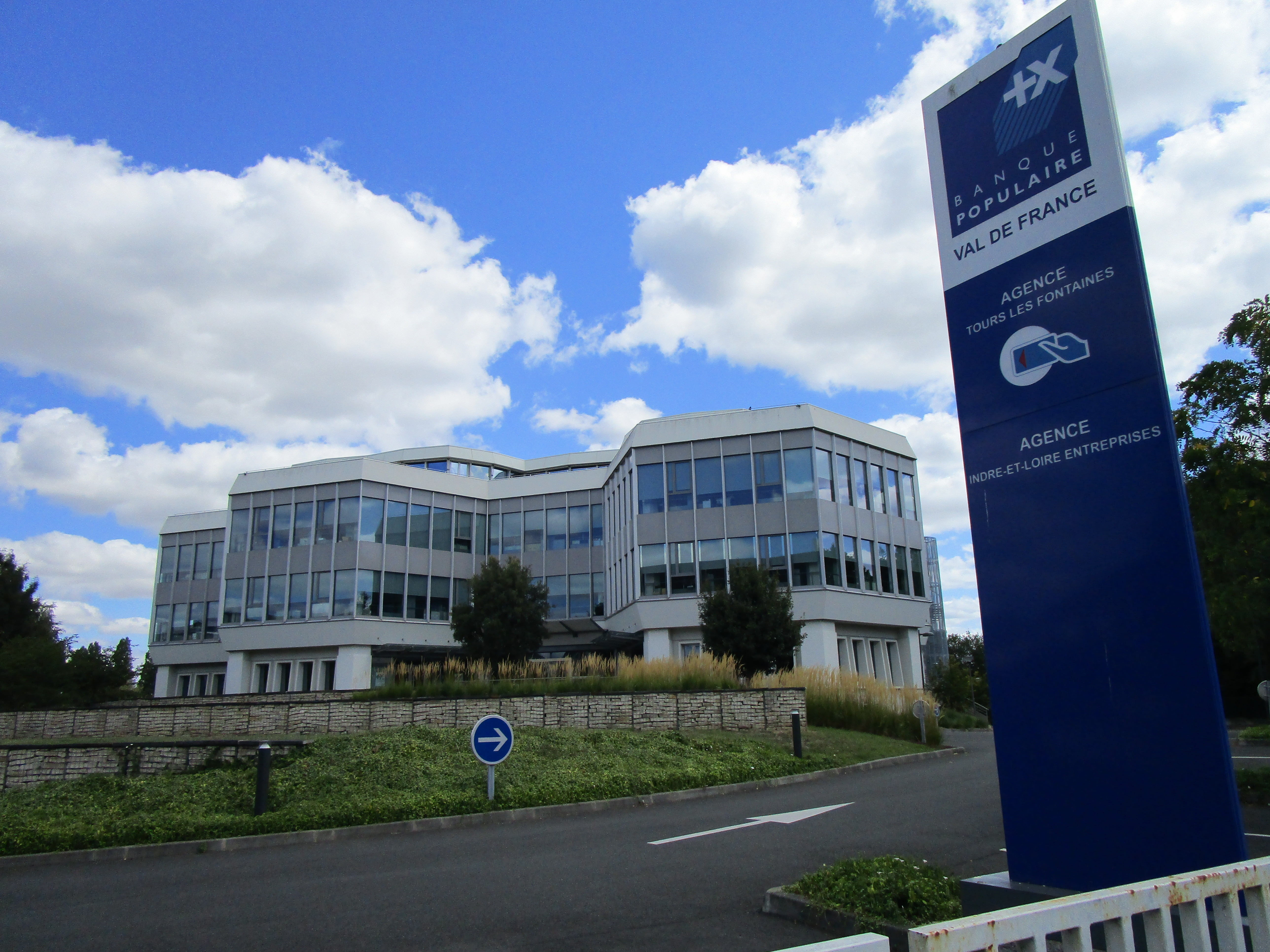 La banque populaire du quartier des Fontaines de Tours, sur l'avenue de Milan.